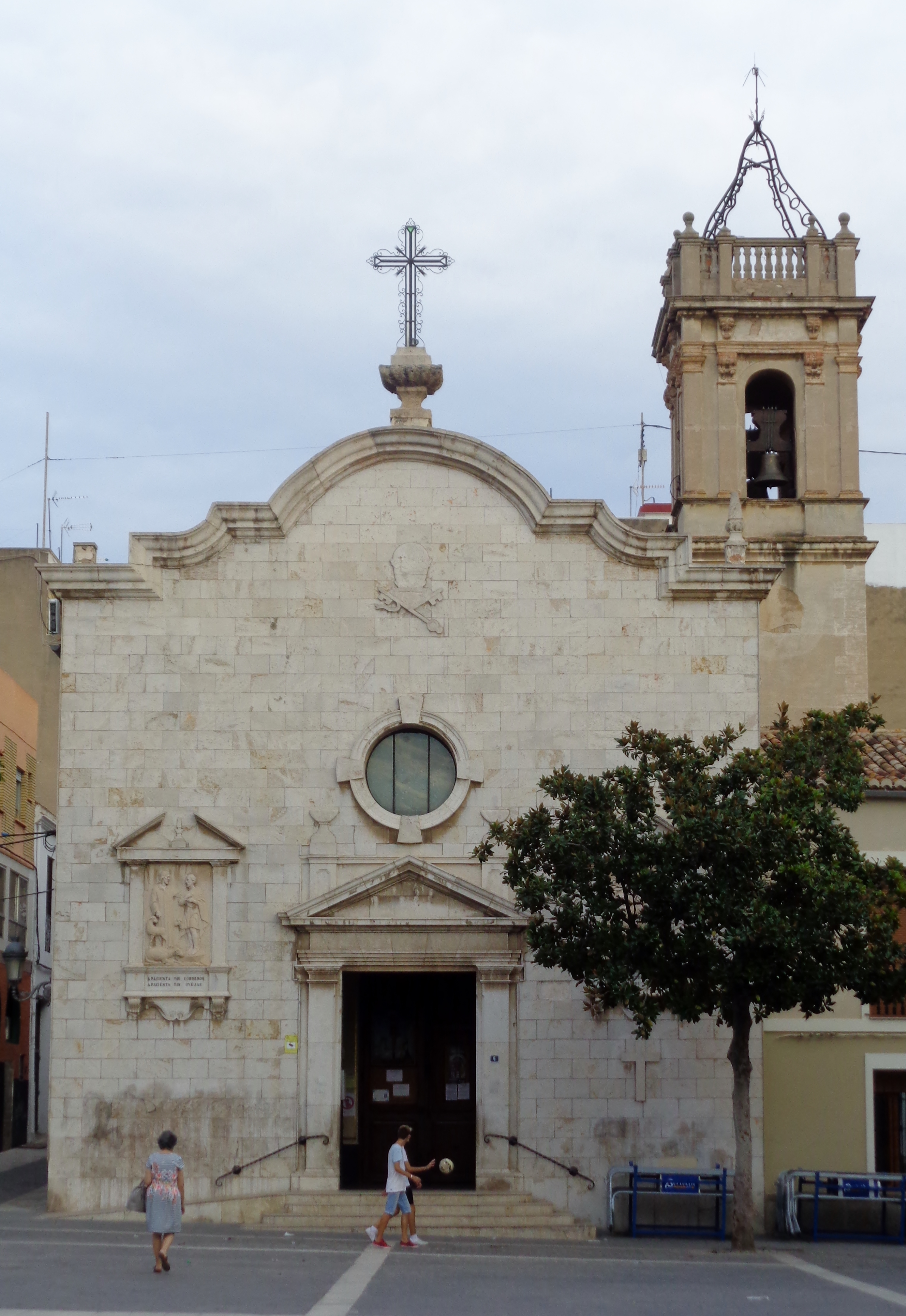 Paterna.